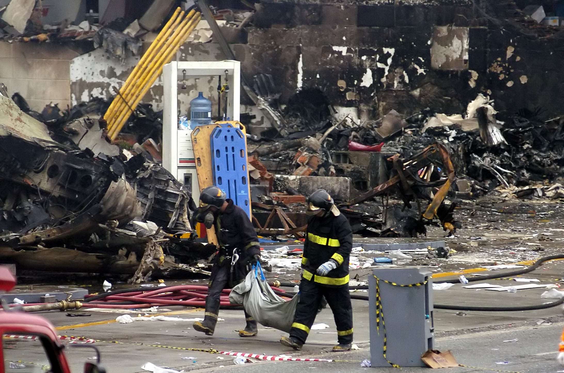 São Paulo - Bombeiros resgatam corpos de vítimas do acidente com o Airbus A-320 da TAM, que causou uma explosão no terminal da companhia, no Aeroporto de Congonhas, no início da noite de ontem (17).